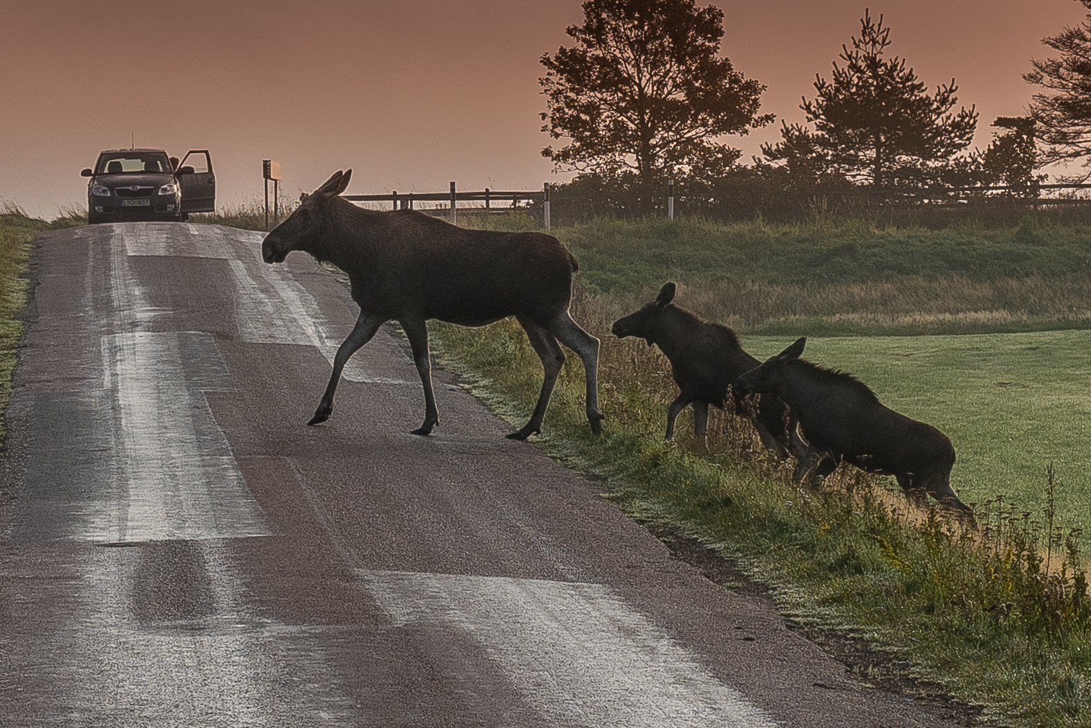 Haverdal October 2014